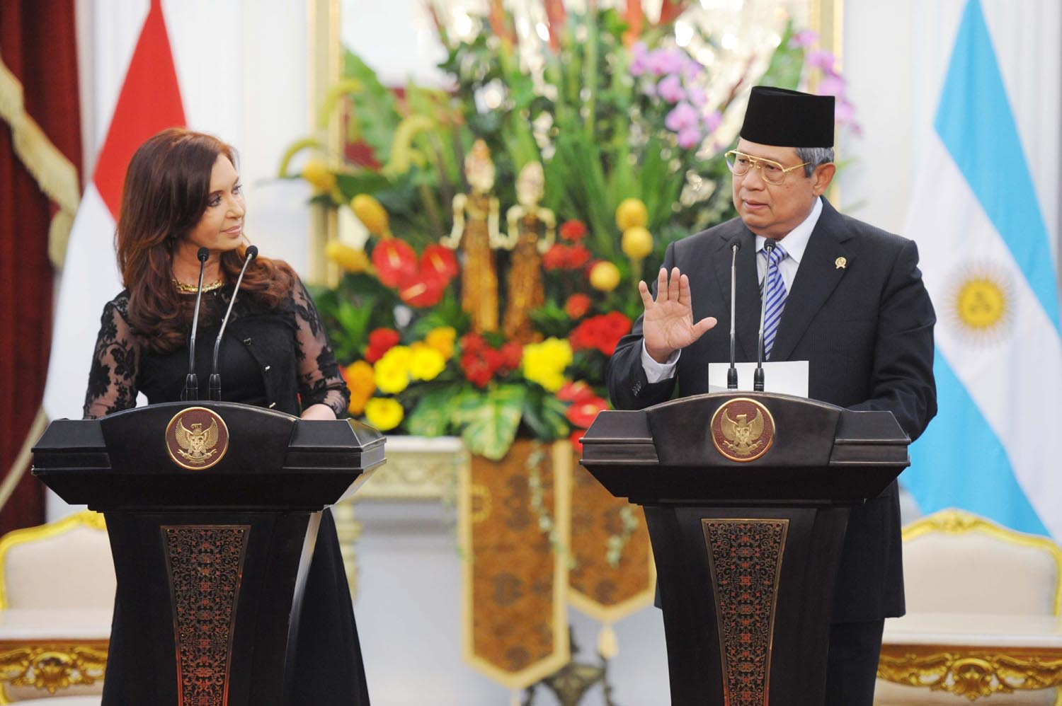 Presiden SBY dan Presiden Argentina Cristina Fernandez memberi keterangan pers bersama tentang hasil pertemuan bilateral di Istana Merdeka, Jakarta, 17 Januari 2013.